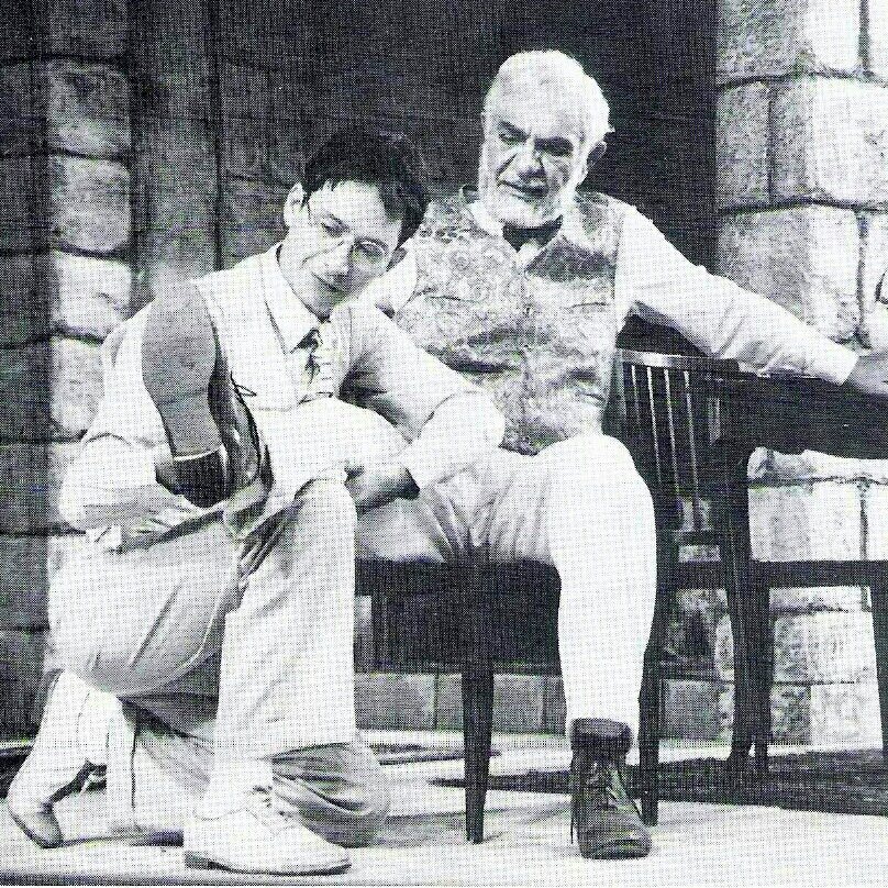 יוסי ידין ורפי אדיר בהצגה "רחם פונדקי", תיאטרון הקאמרי